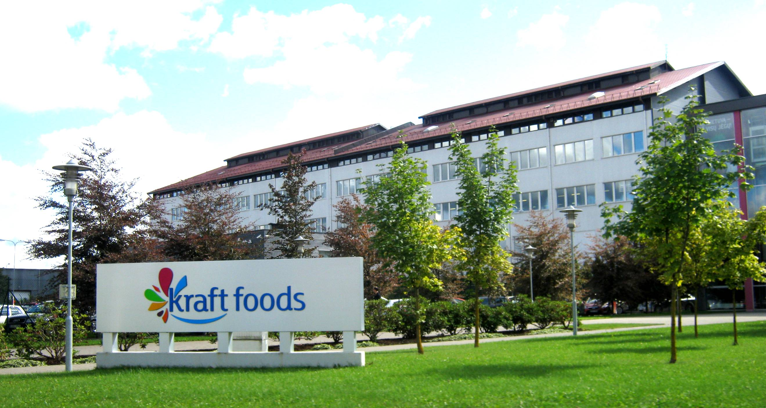 Kraft Foods